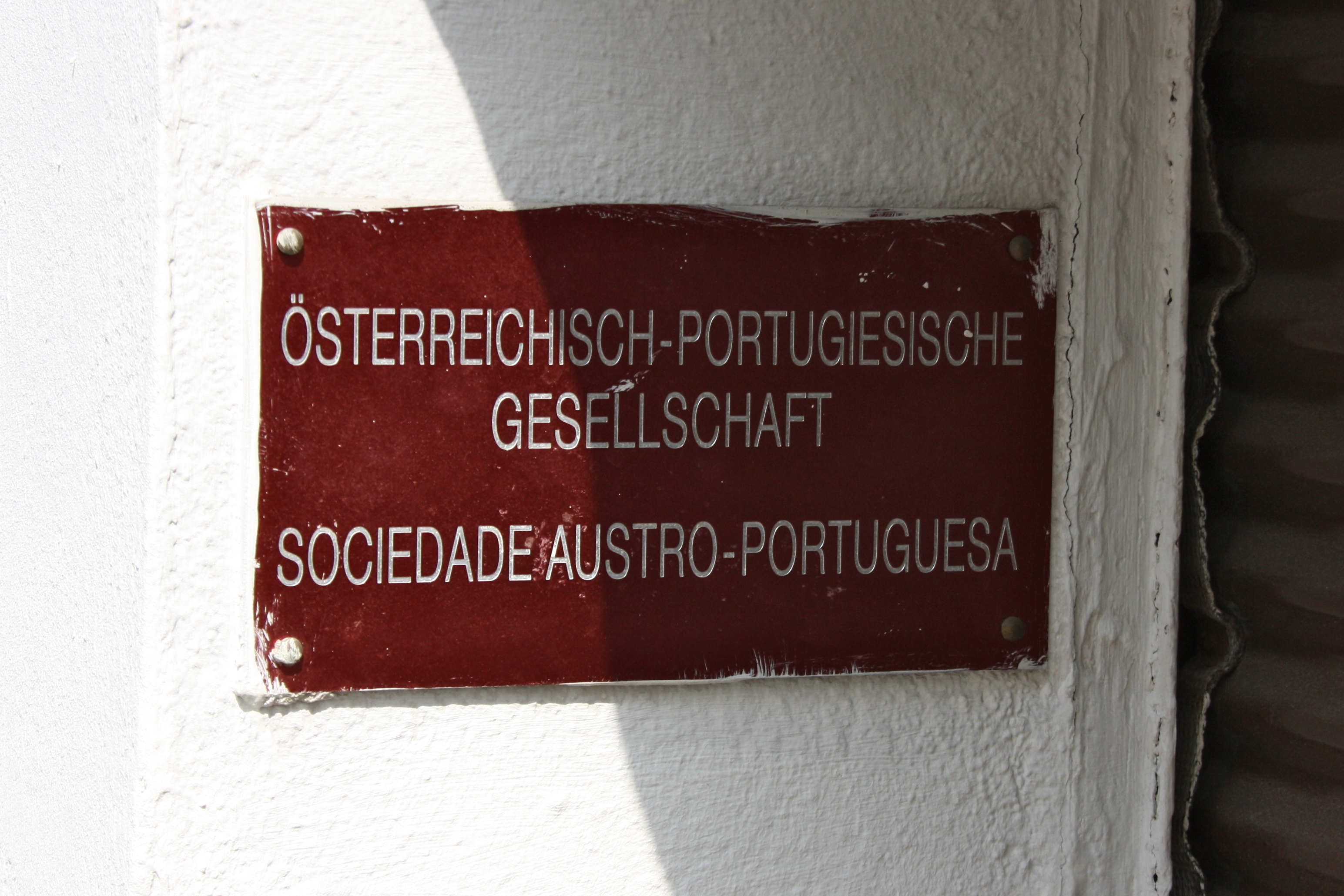 Schild am Sitz der Österreichisch-portugiesischen Gesellschaft in der Piaristengasse 34, Wien-Josefstadt.